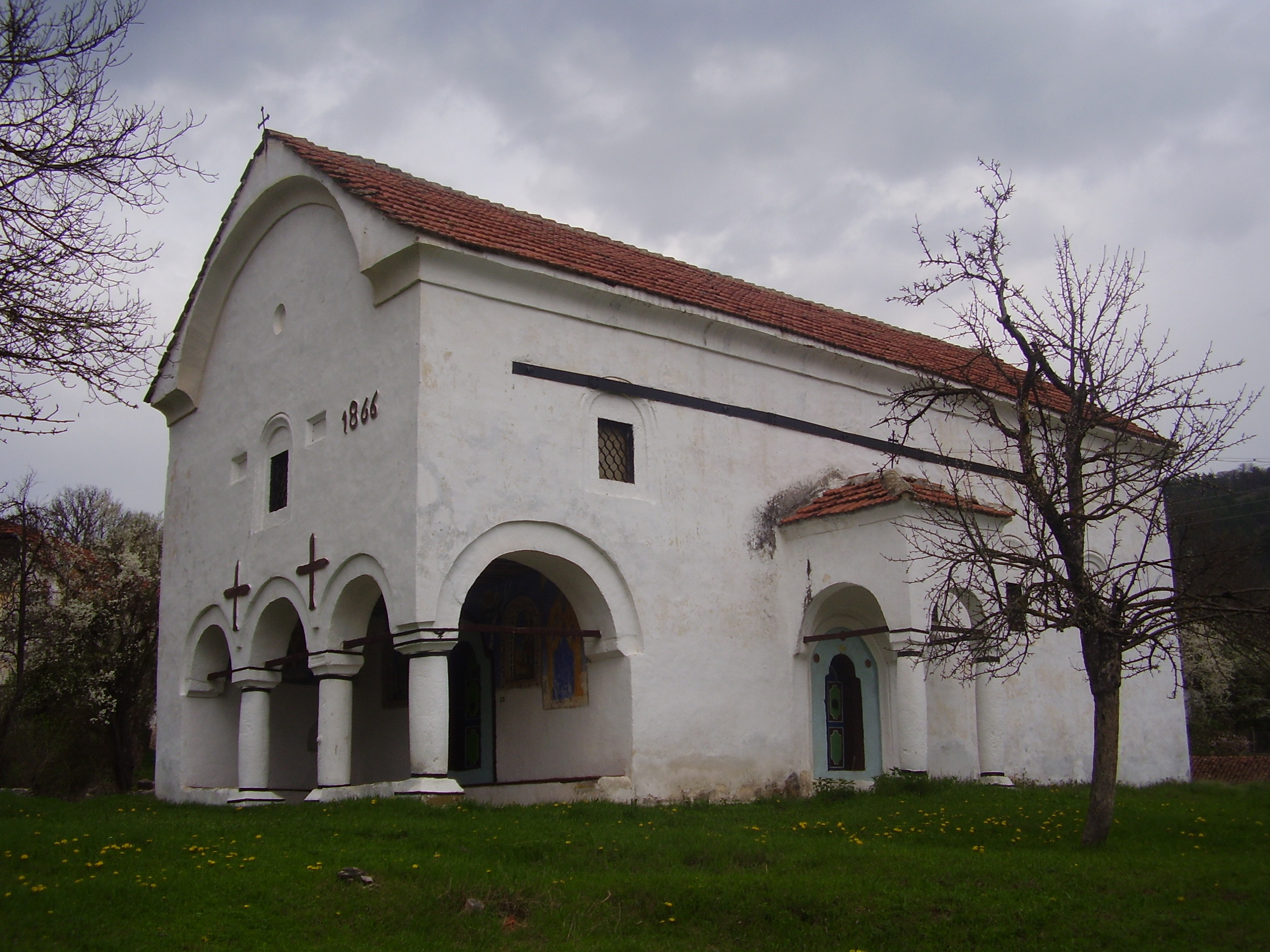 Църквата Св.Георги в с.Горно Уйно